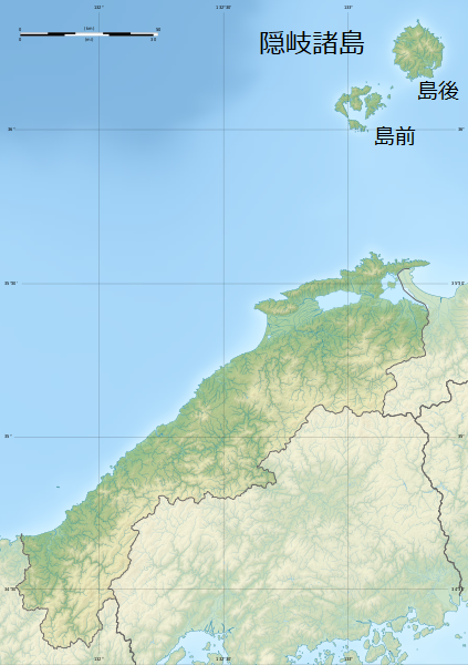 島根県における隠岐諸島の位置。